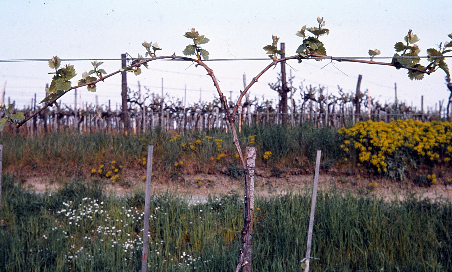 Hochkordon-Erziehung nach dem Austrieb, Aufbau des haengenden Kordon